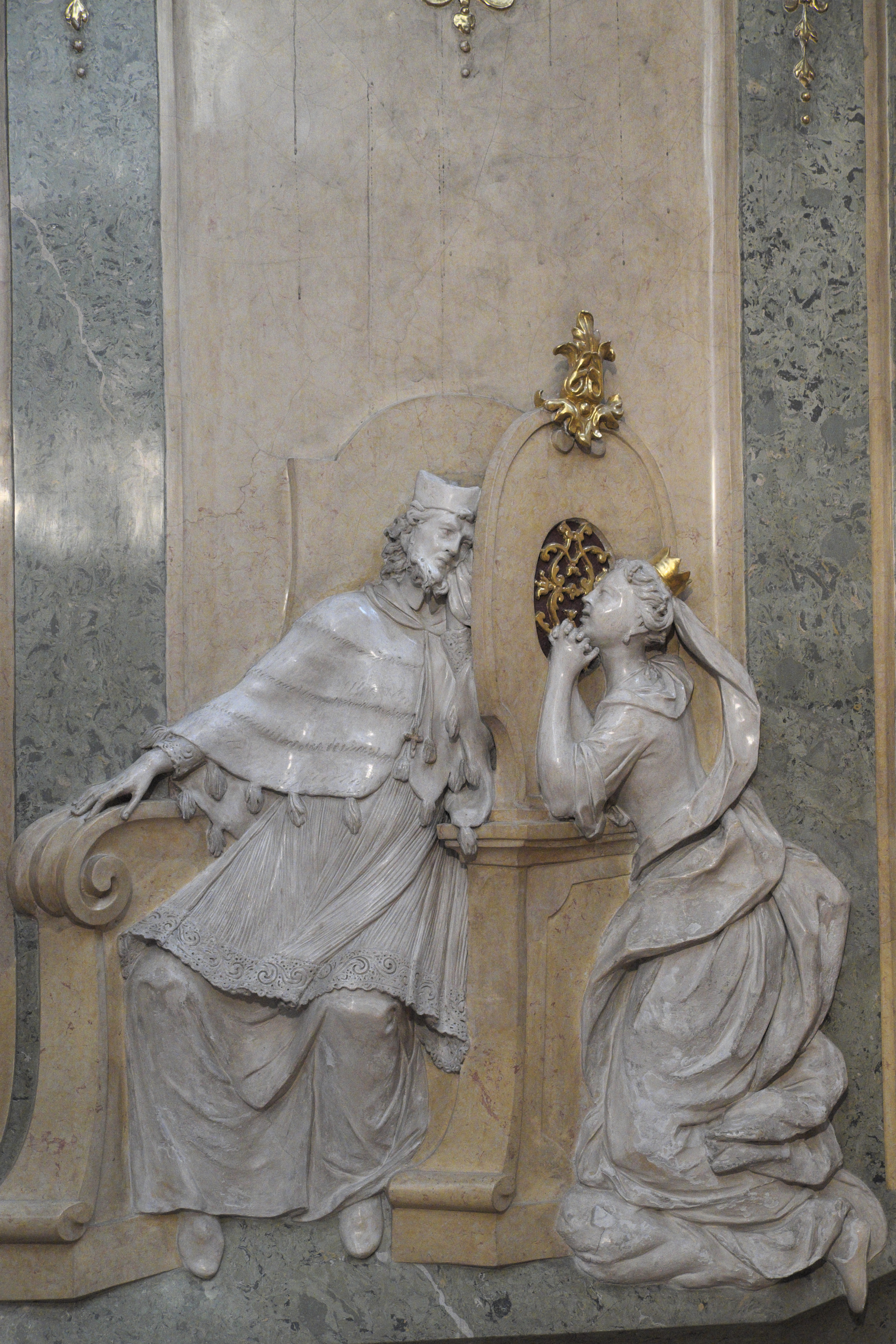 Servitenkirche im 9. Gemeindebezirk (Alsergrund) in Wien (Österreich)